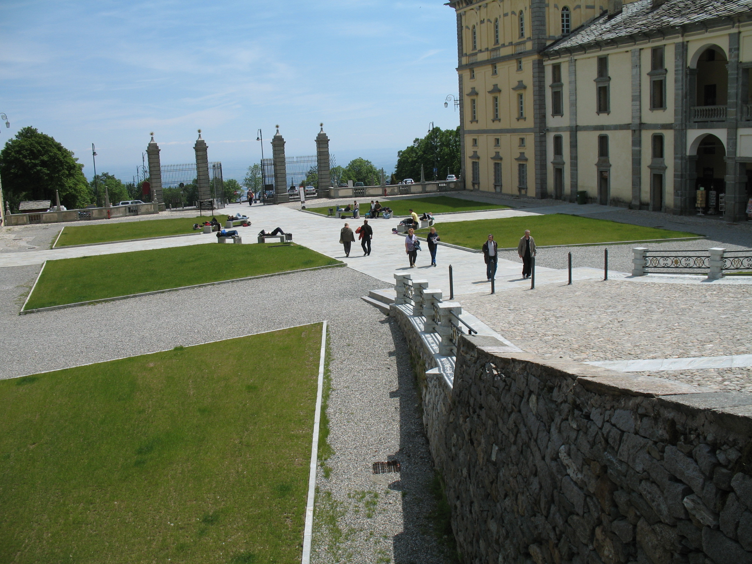 Immagine da Biella, santuario di Oropa